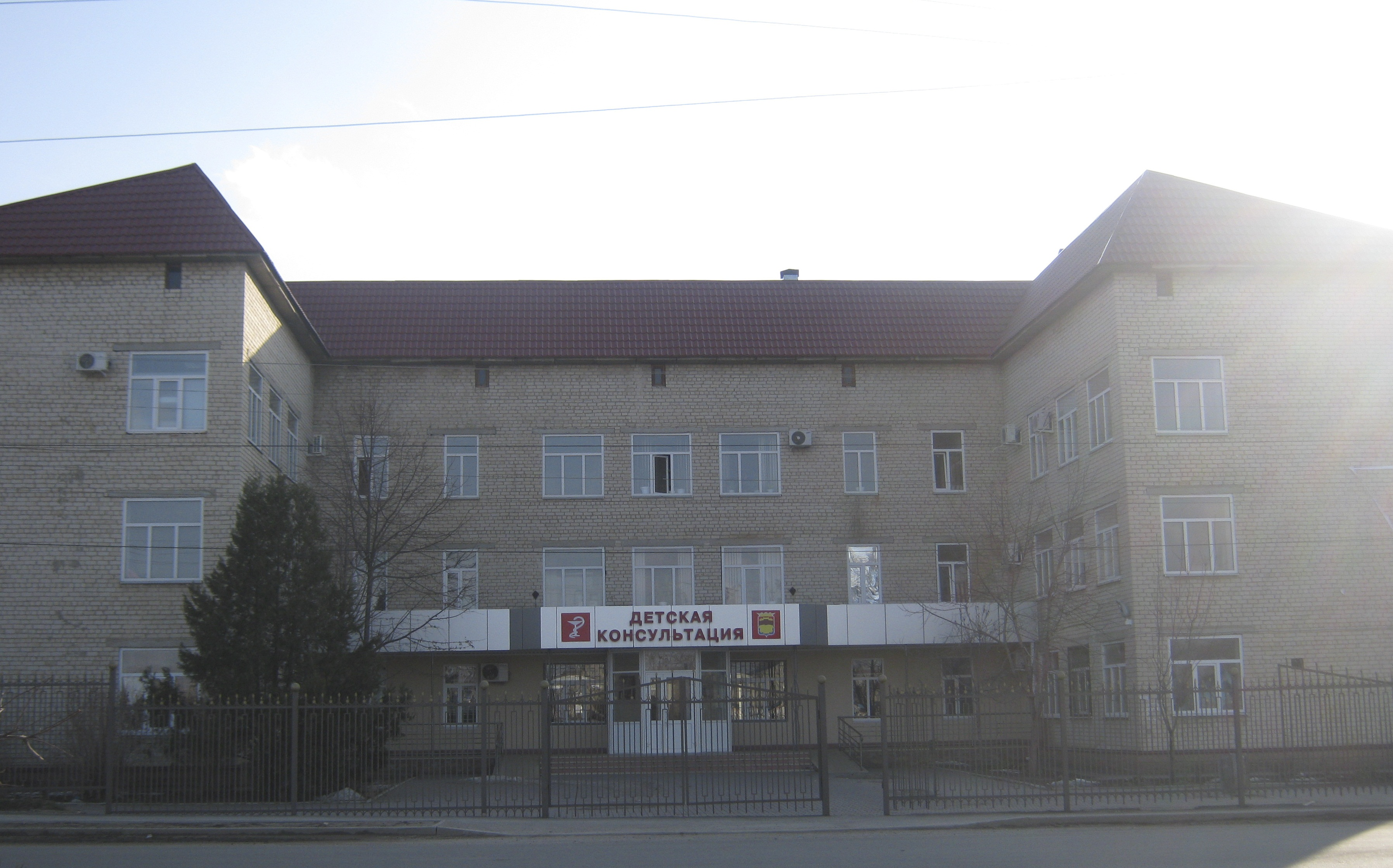 Здание детской консультации в городе Светлограде,на улице Николаенко